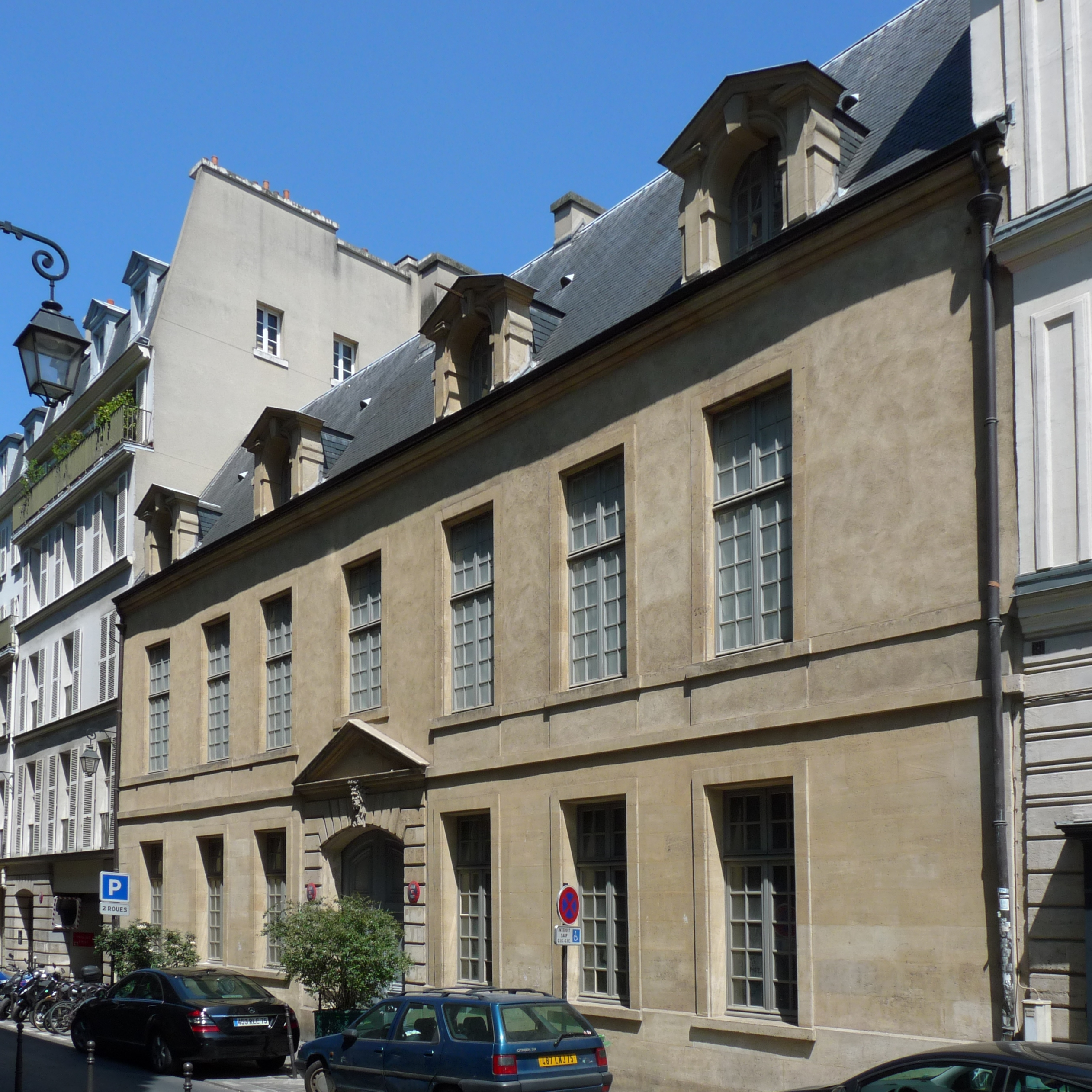 Hôtel particulier au numéro 4 de la rue des Haudriettes à Paris